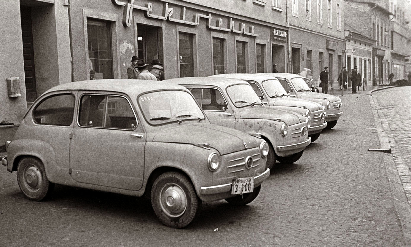 V Maribor je prispela prva pošiljka malih osebnih avtomobilov Fiat 600